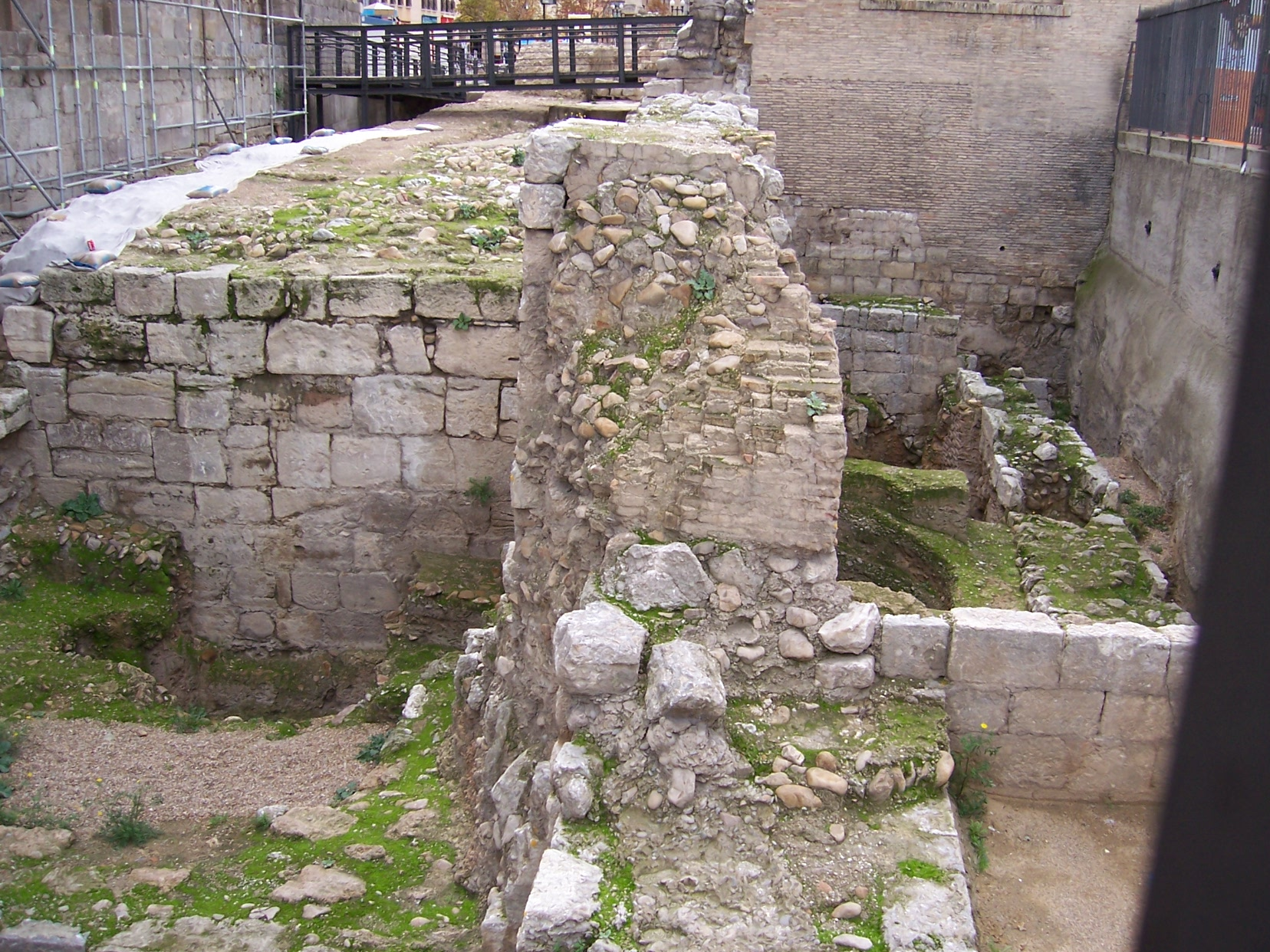 Ruinas de murallas romanas en Zaragoza (España). Noviembre de 2005.